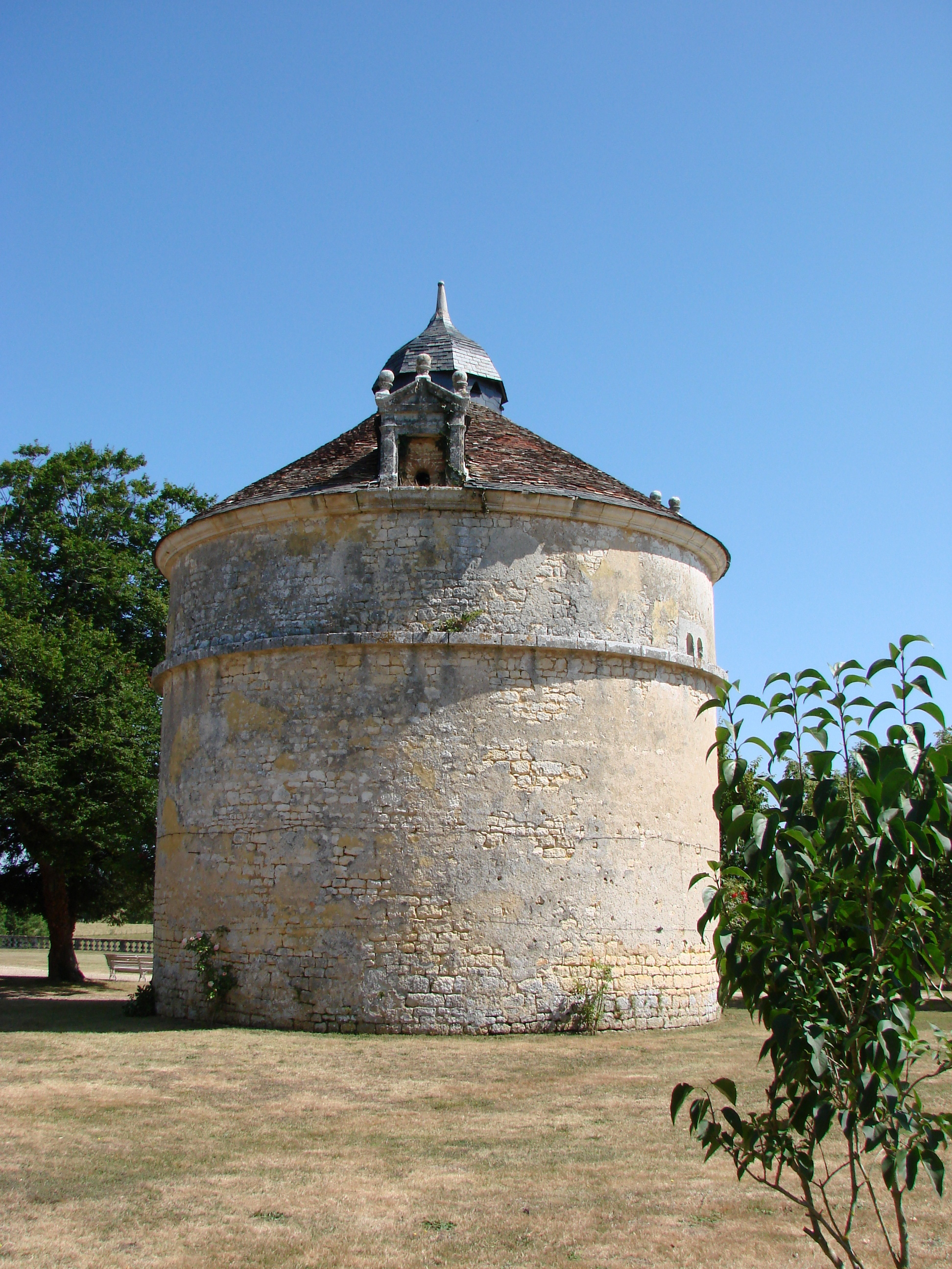 La fuie du